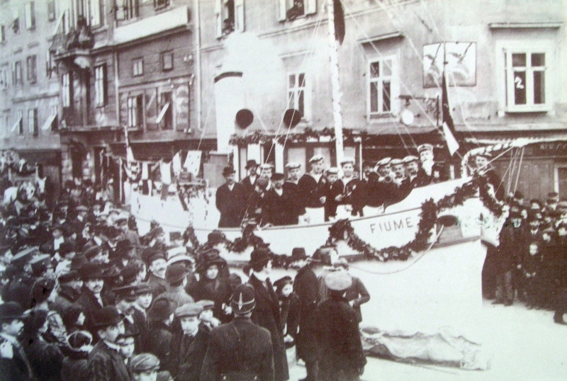 Mesopust u Rijeci početkom 20. stoljeća